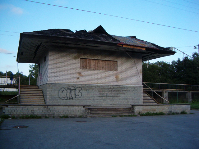 Laagri raudteepeatus